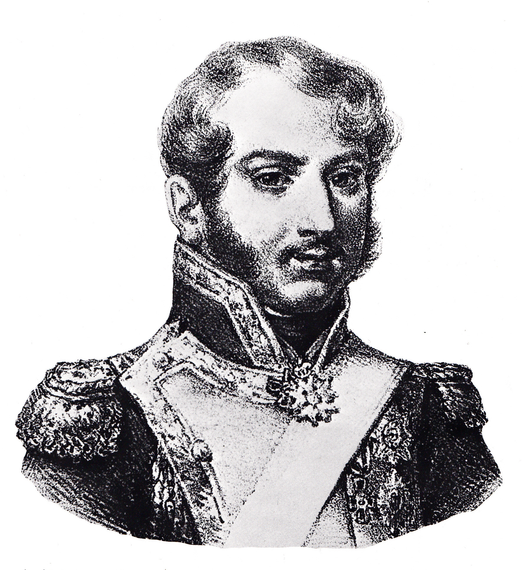 Le général Wincenty Krasiński, colonel du 1er régiment de lanciers polonais de la Garde impériale et comte d'Opinagora.